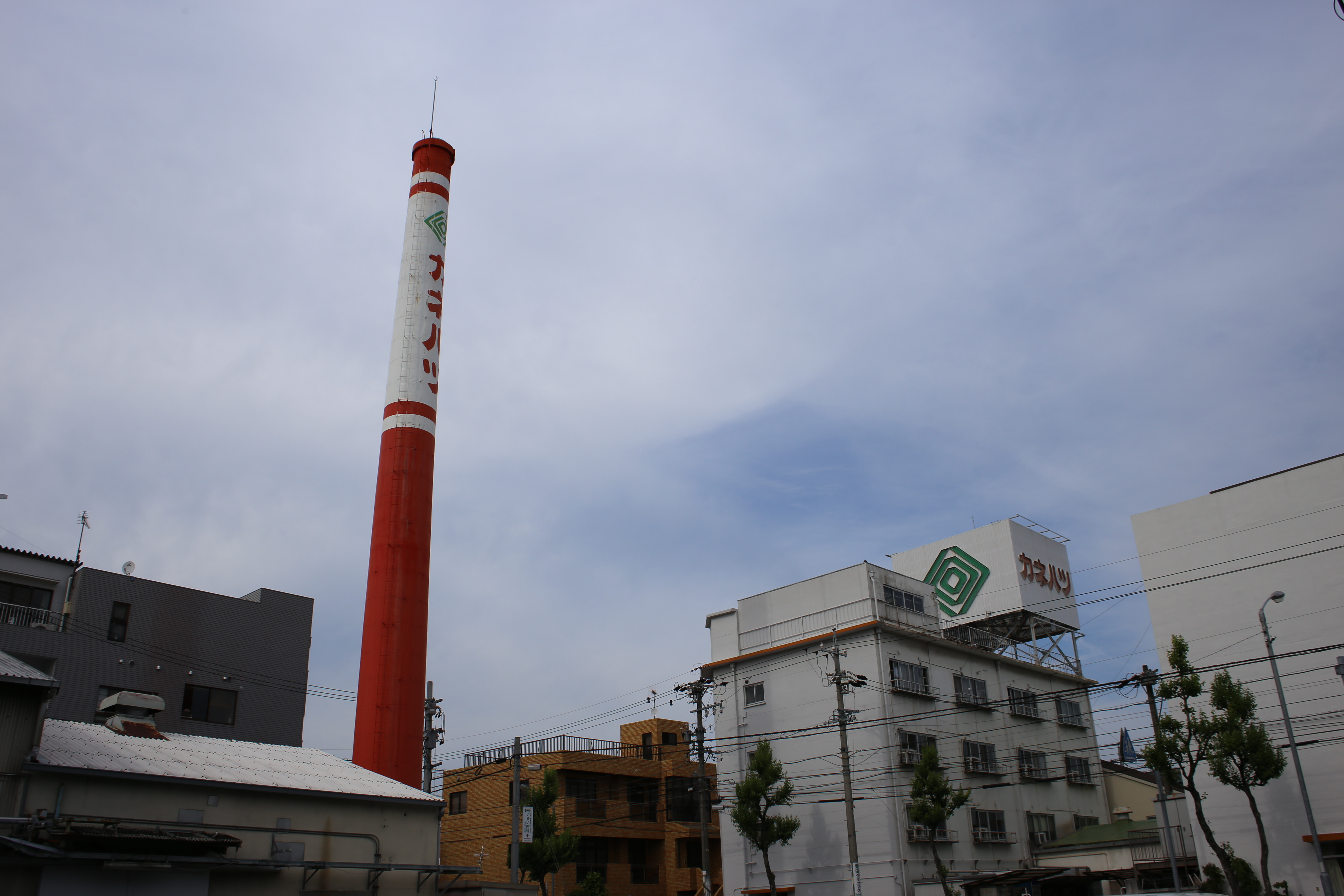 名古屋市南区豊のカネハツ食品本社の一部を撮影